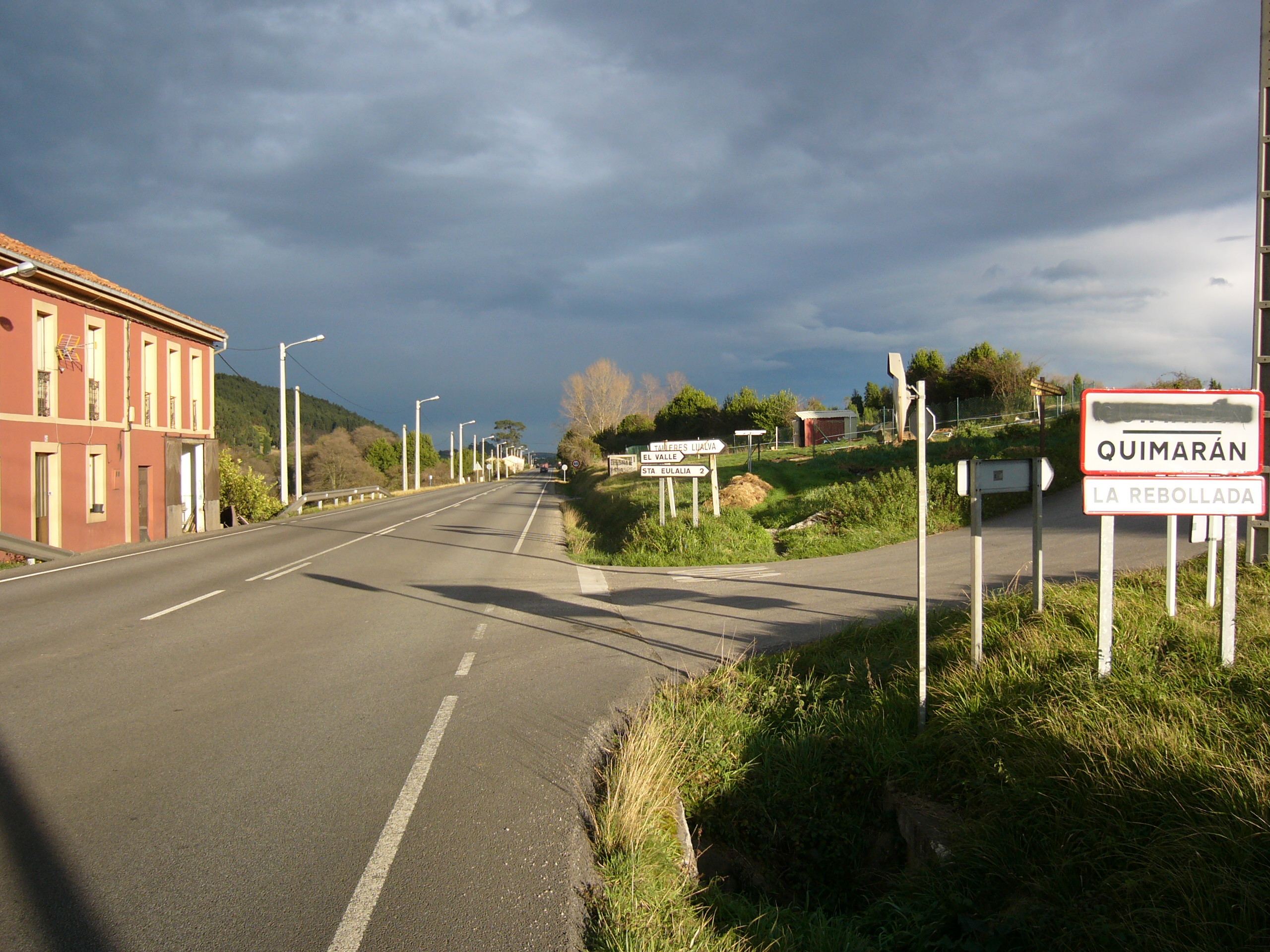 AS-19 road in Quimarán (Carreño - Asturies - Spain)